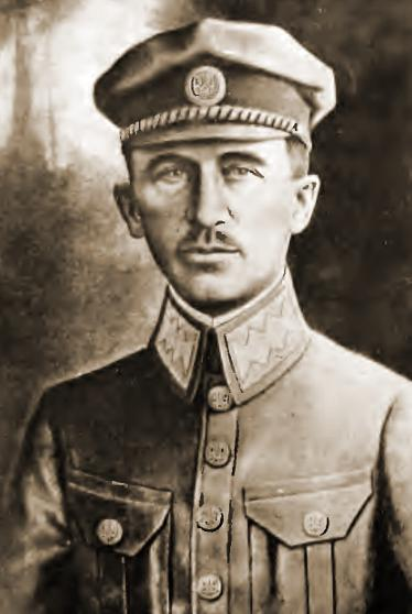 генерал-хорунжий Осип Микитка (1871-1920)